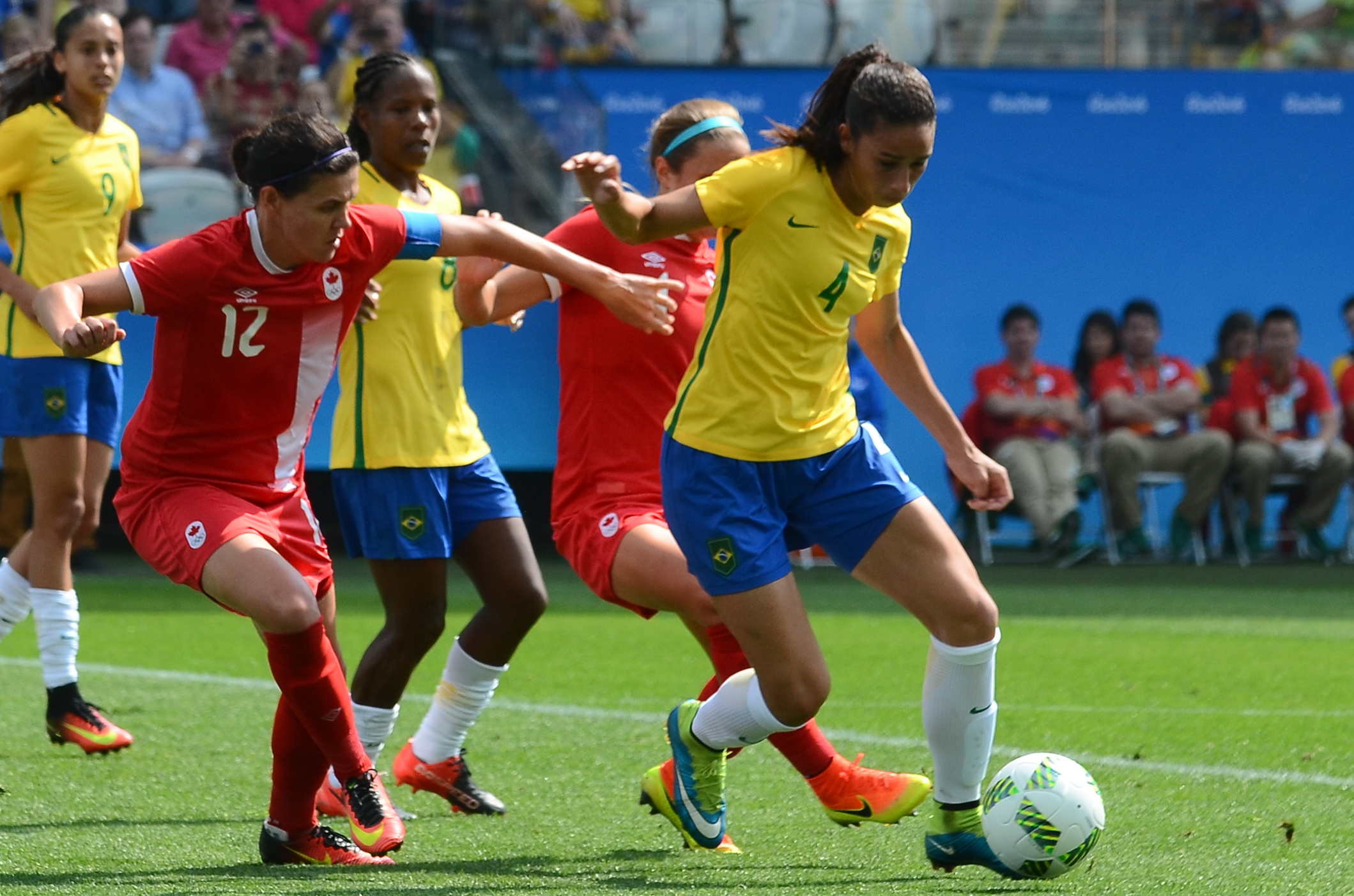 São Paulo - Canadá vence o Brasil por 2 a 1 e fica com a medalha de bronze no futebol feminino dos Jogos Olímpicos, na Arena Corinthians (Rovena Rosa/Agência Brasil)